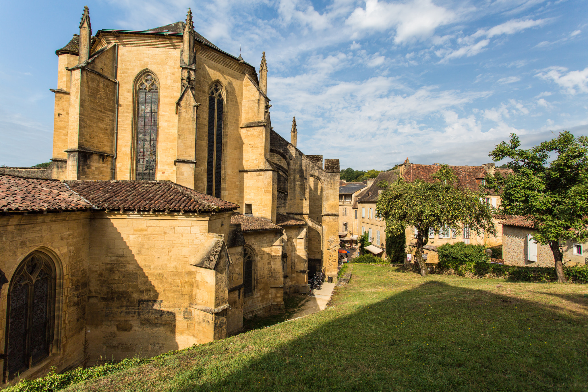 500px provided description: Il fait bon vivre en P?rigord Noir. [#gastronomie ,#patrimoine ,#5D3 ,#Nature ,#France ,#Canon ,#Photography ,#Outdoor ,#Paysage ,#Photographie ,#Dordogne ,#Wild ,#Sarlat ,#Famille ,#Verdure ,#Campagne ,#Sud-Ouest ,#Exterieur ,#P?rigord ,#5DMK3 ,#C?dric ,#DuDuLifeStyle ,#DuDu ,#S?rie L ,#Vieille France ,# ,# ,#Onsort ,#En Famille]